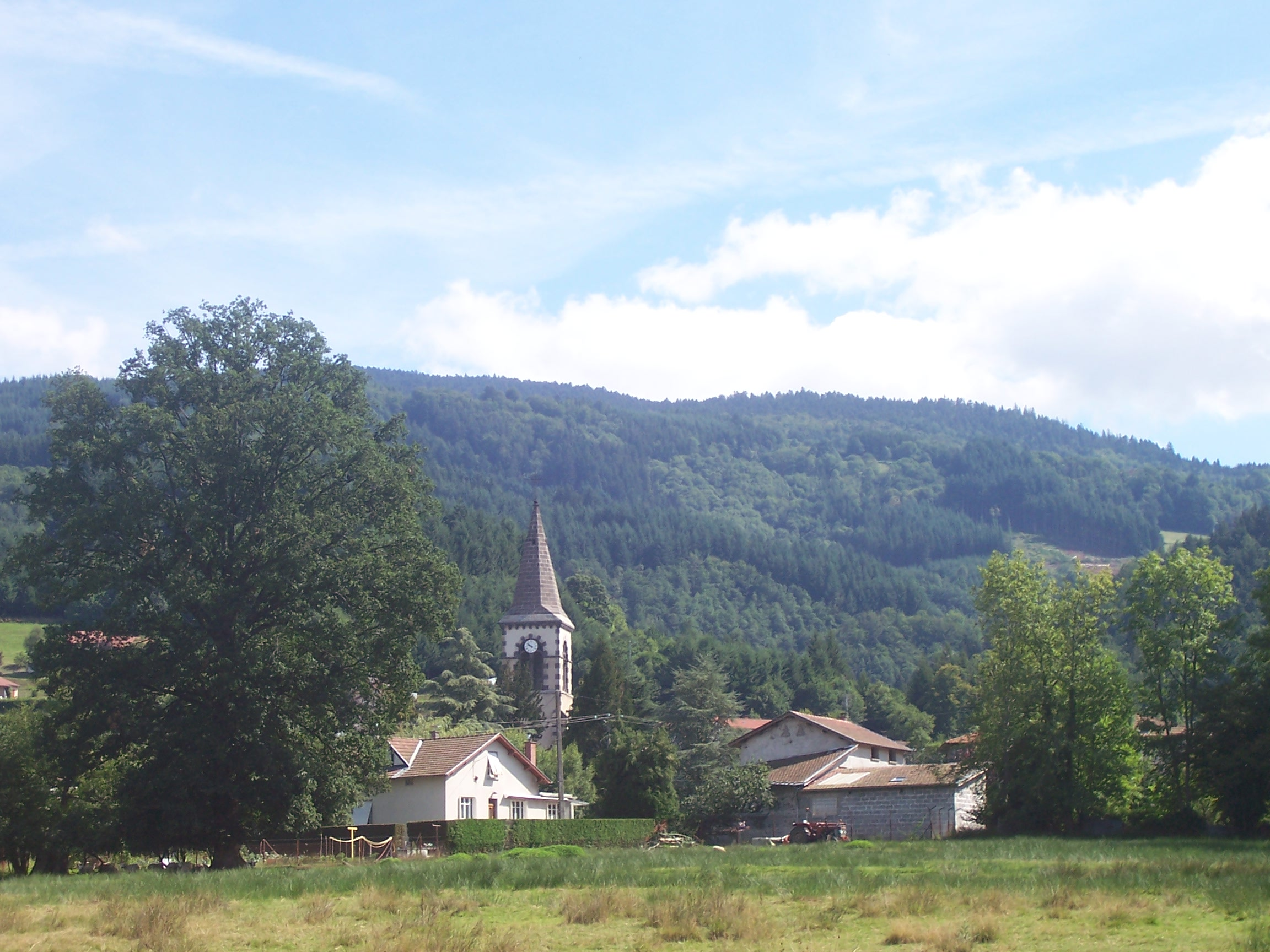 Vue du petit village de la forie